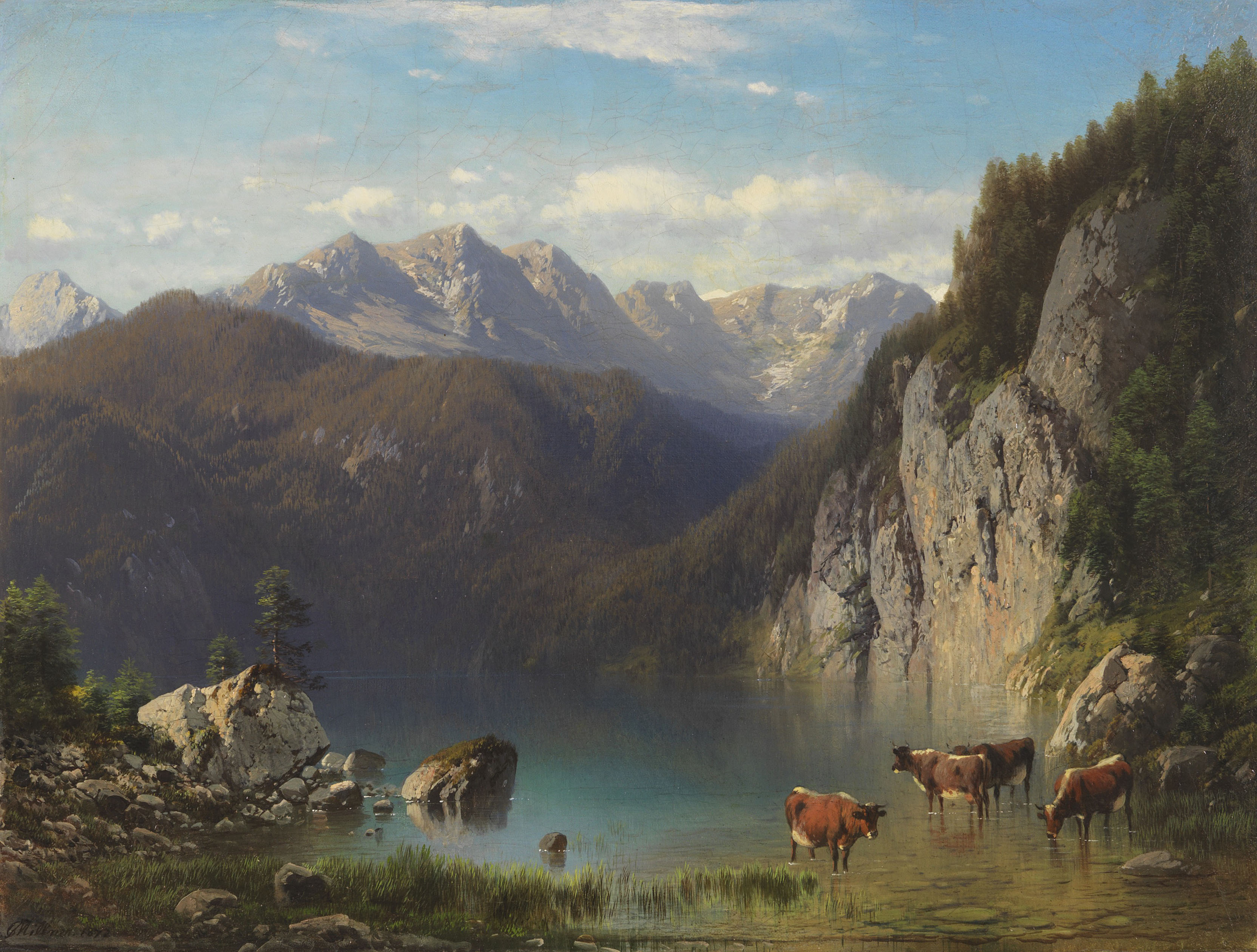 Der Alpsee bei Hohenschwangau. 1872. Öl auf Leinwand. Links unten signiert und datiert. 38 x 50 cm